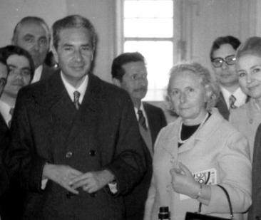 Aldo Moro con la moglie, Eleonora Chiavarelli